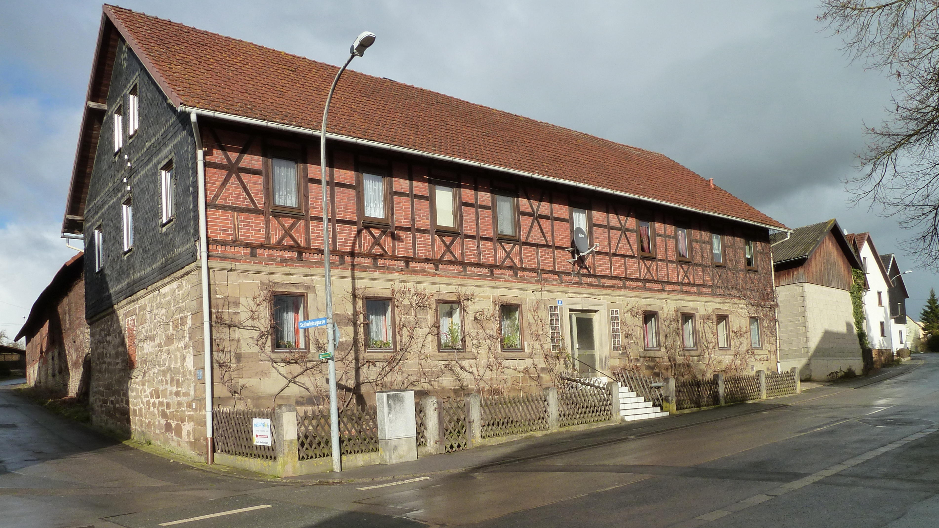 Ehemaliges Gutshaus des Kammergutes in Großwalbur